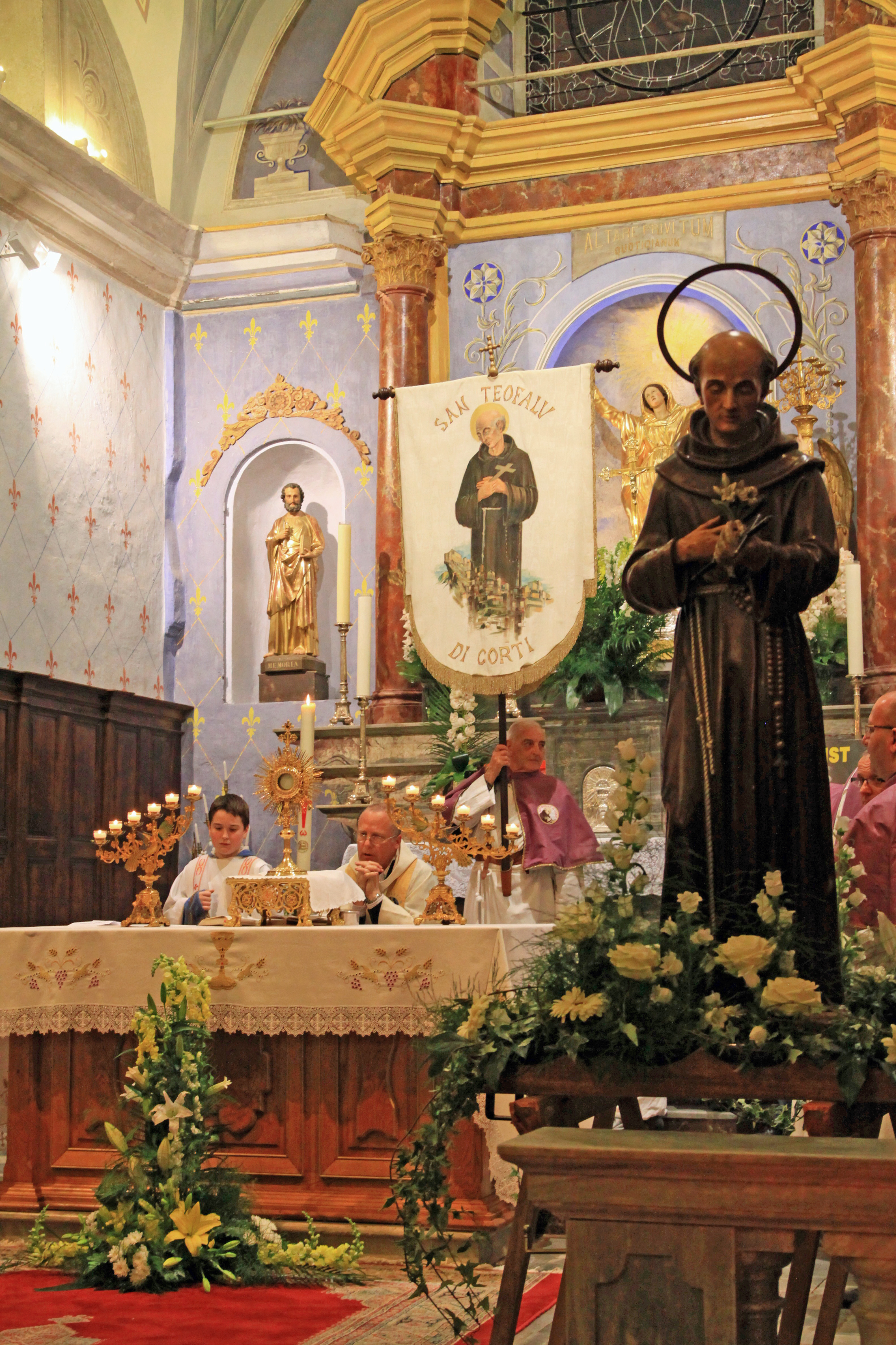 Corte (Corse) - San Teofalu dans l'église de l'Annonciation